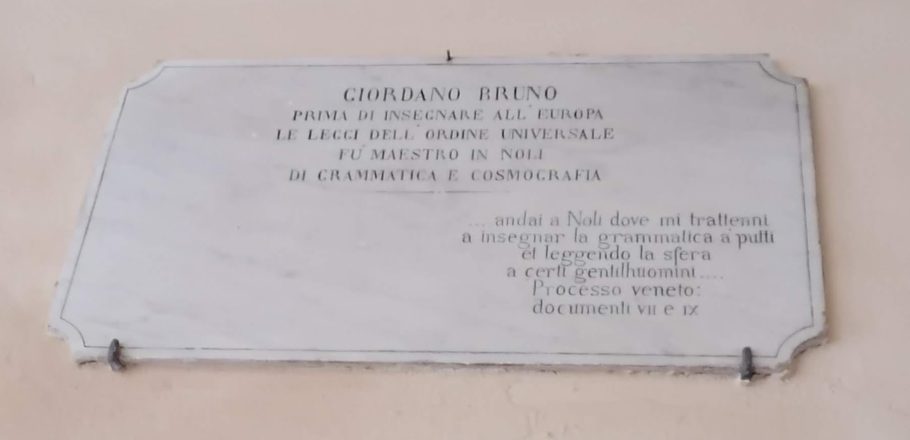 Targa commemorativa di Giordano Bruno nella Loggia della Repubblica Nolese.